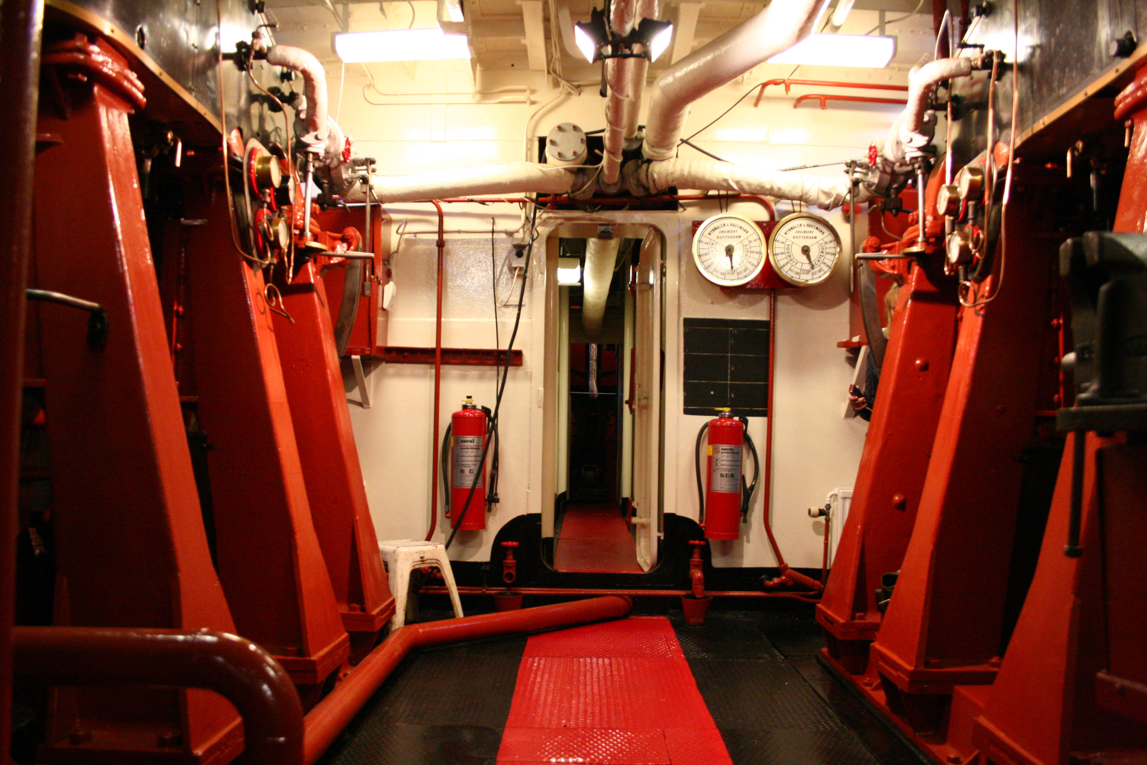 Stoomtechniek behouden